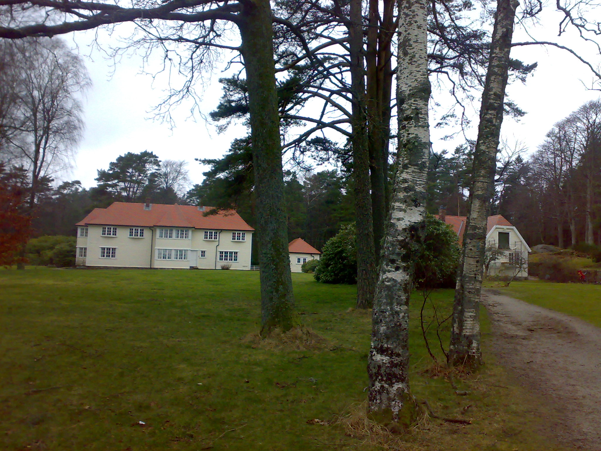 Risøbank Risöbank Risoebank Mandal Norway